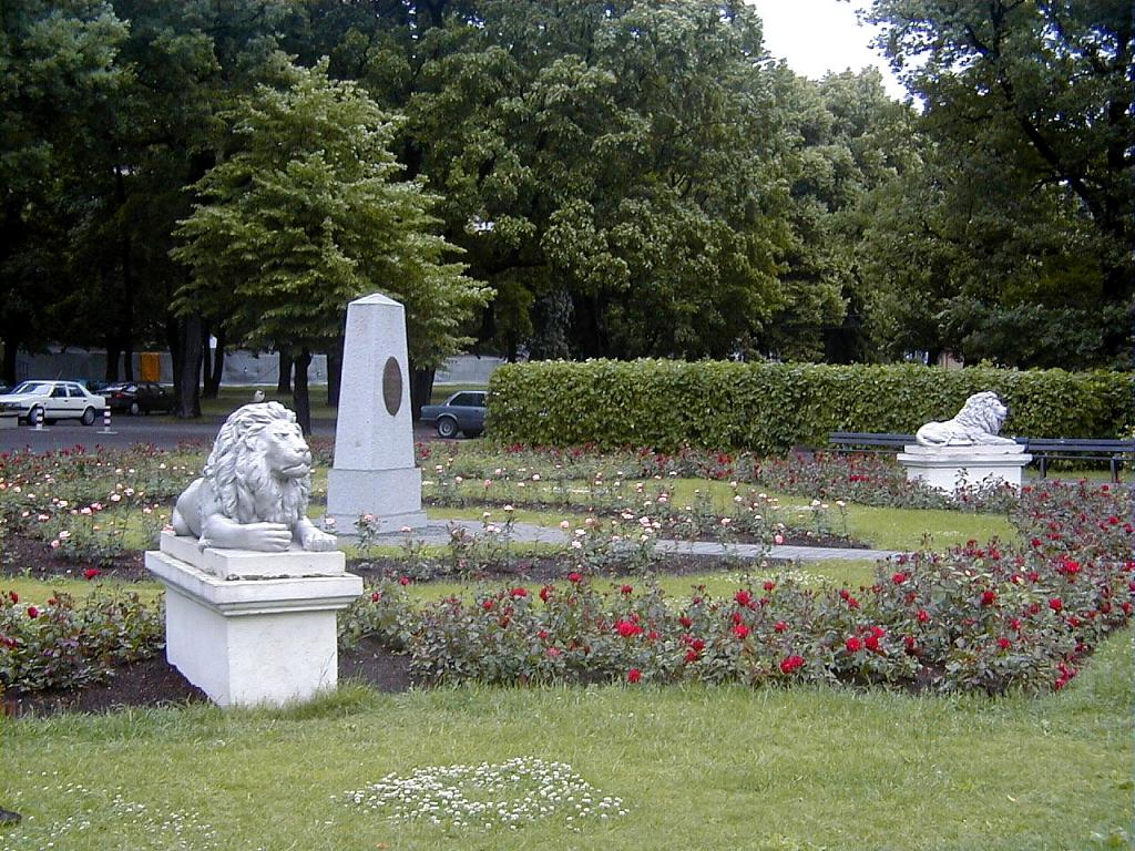 Rīga, A.Vērmanes piemiņas ansamblis 2002-06-14